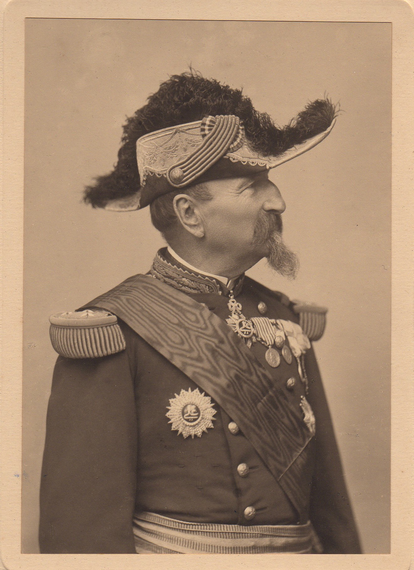 photo de Paul Alexandre Détrie